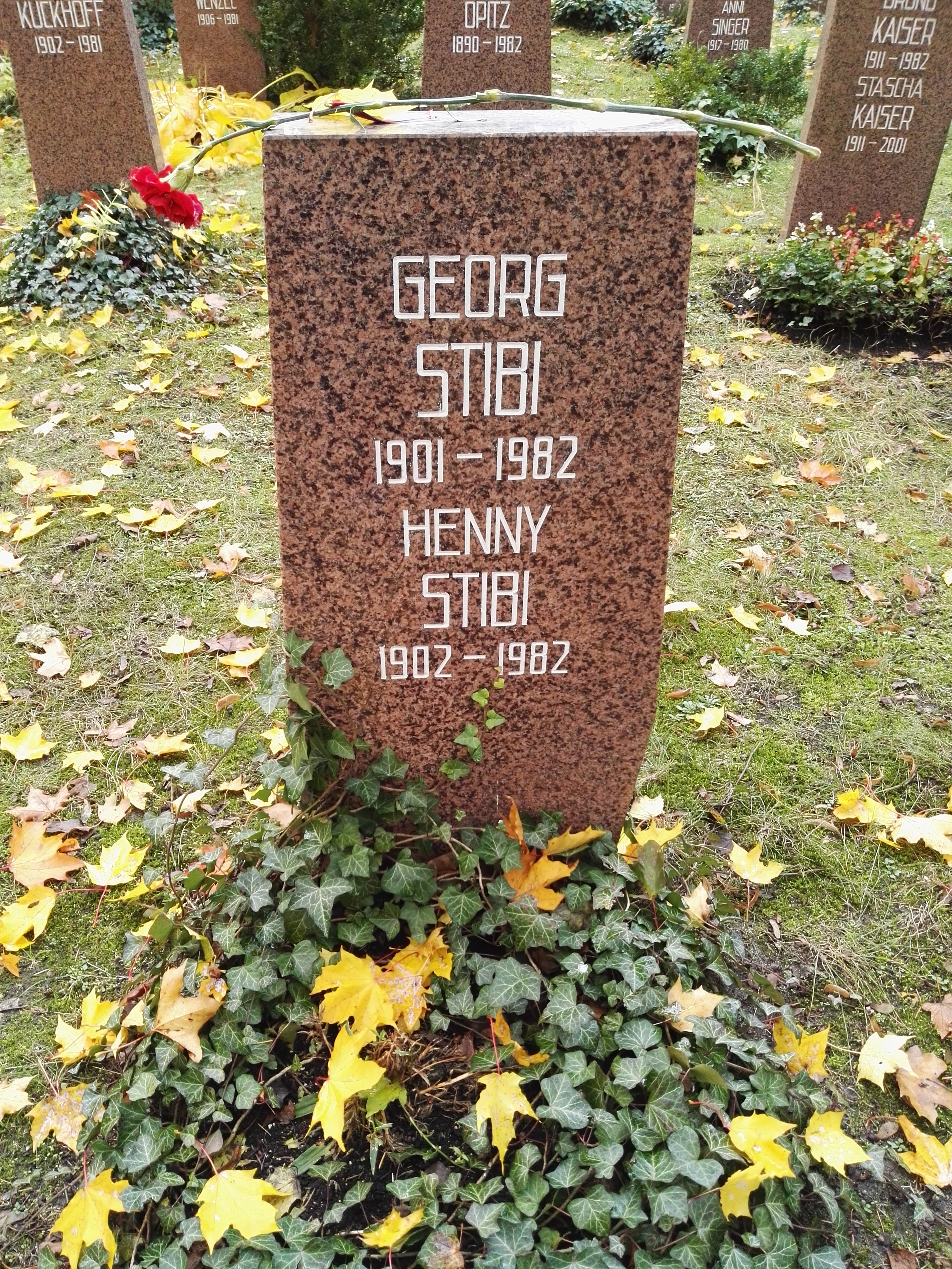 Grab von Georg Stibi und Henni Stibi auf dem Sozialistenfriedhof des Zentralfriedhofs Friedrichsfelde